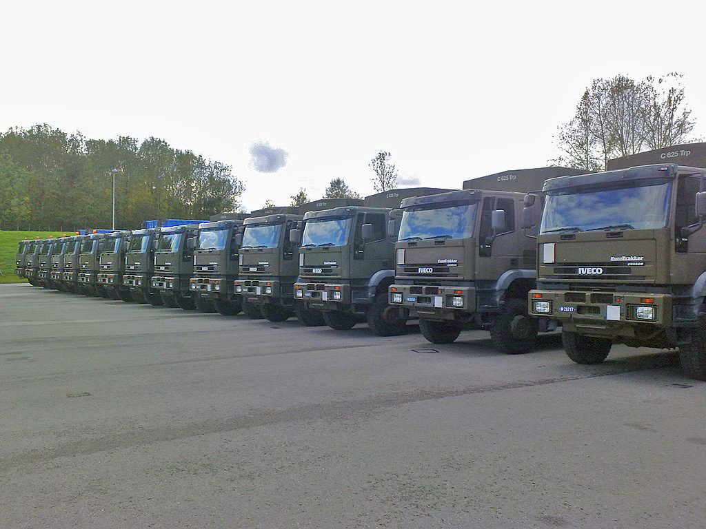 14 Iveco EuroTrakker de l'armée suisse